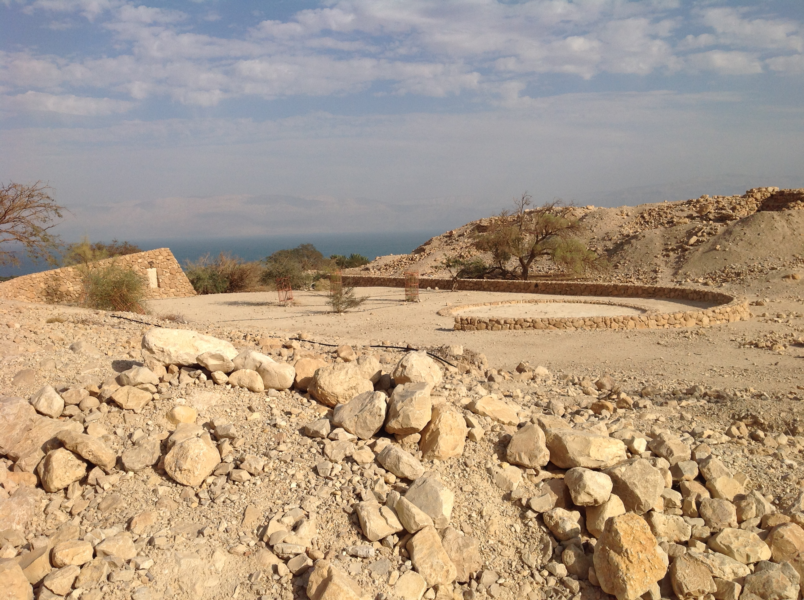 אנדרטה לזכר אסון המטיילים בעין גדי הוא אסון שאירע אור ליום 9 באפריל 1942